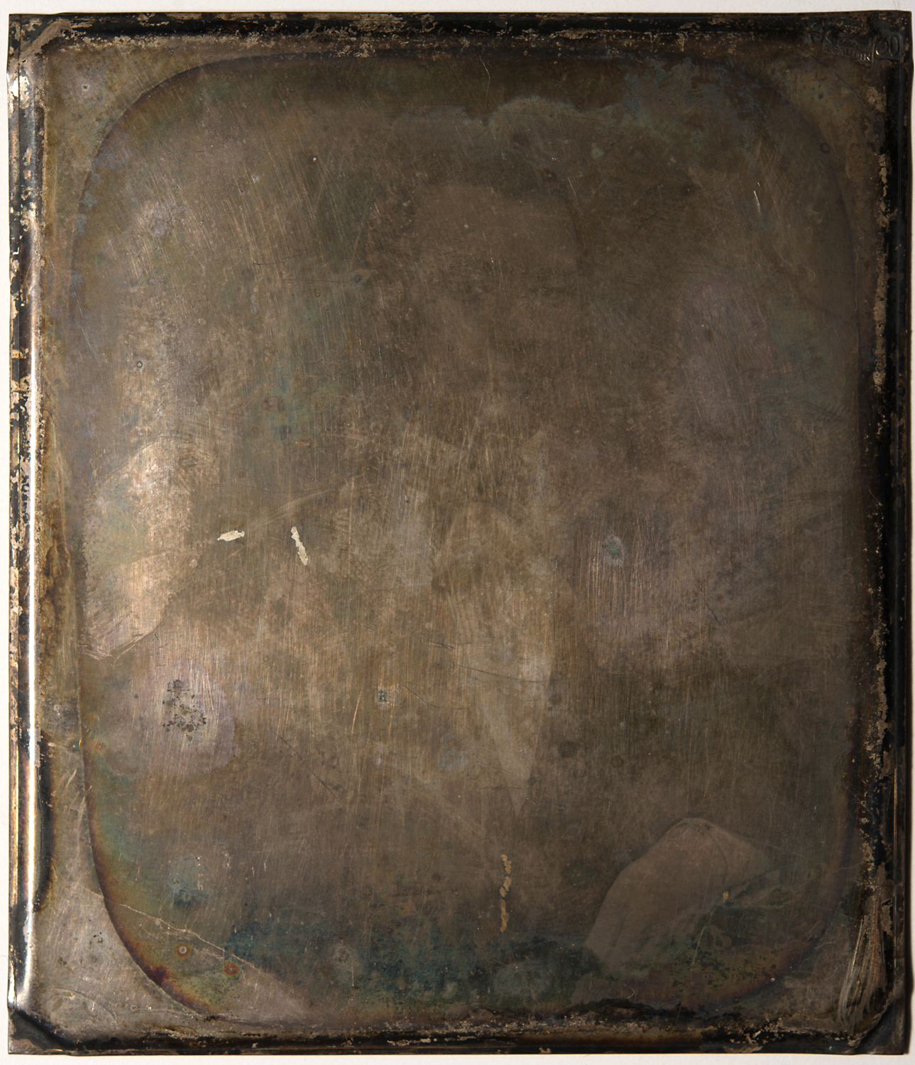 Dagerrotüüp SA Haapsalu ja Läänemaa Muuseumid kollektsioonis. Daguerreobase:HM_1491_Ff 1862 MUIS:HM _ 1491 Ff